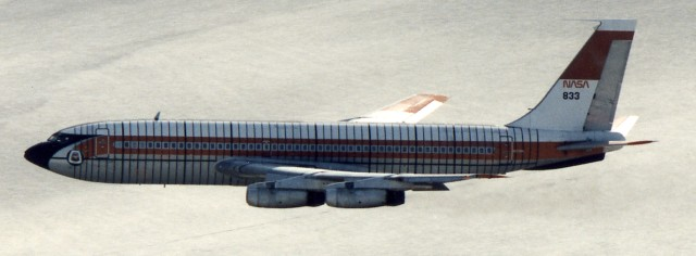 Boeing B-720 der NASA. von Ausschnitt gesetzt